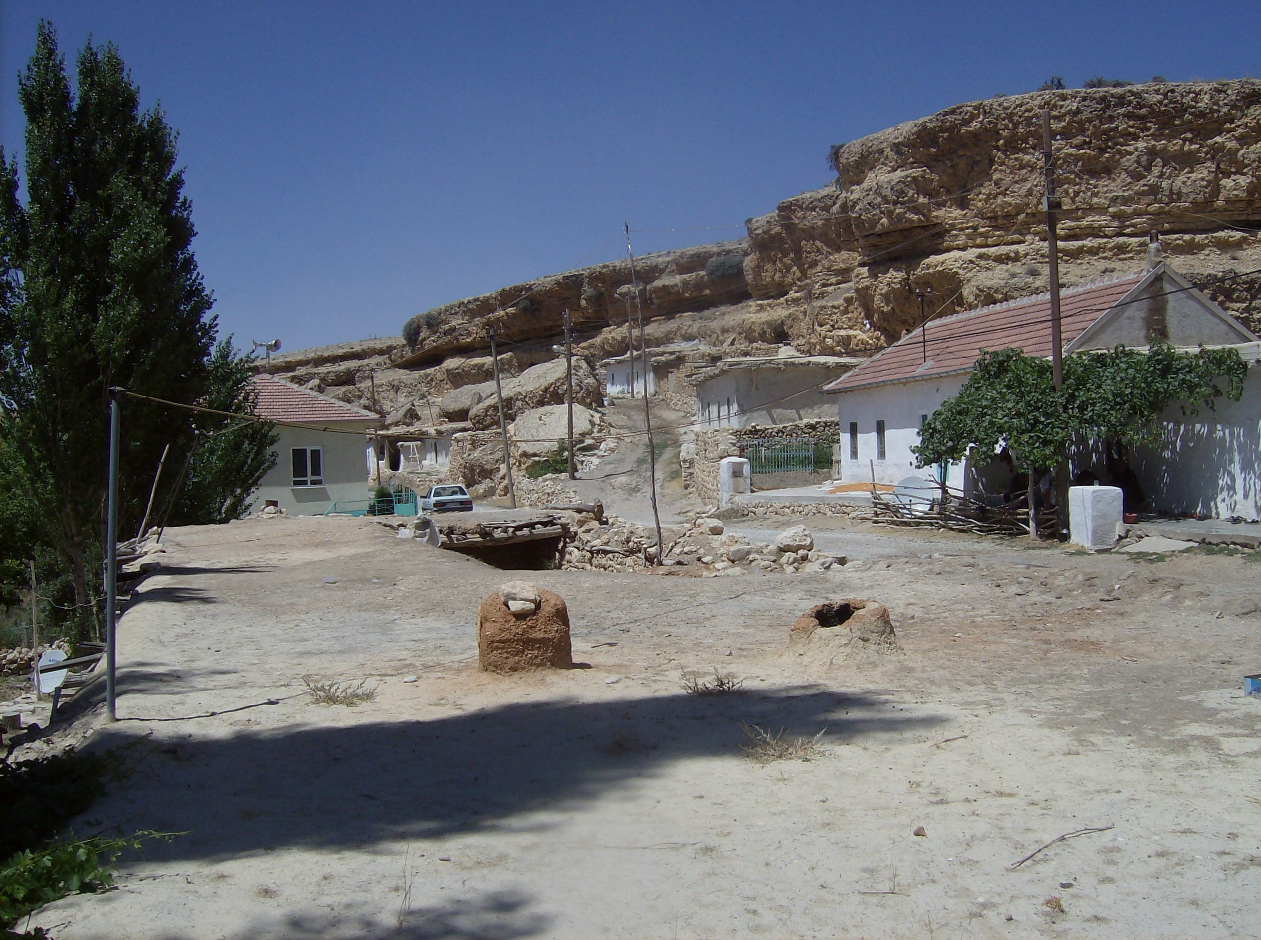 Karaman Ayrancı ilçesine bağlı Akpınar Köyü Andıkara Mahallesinden bir görünüm